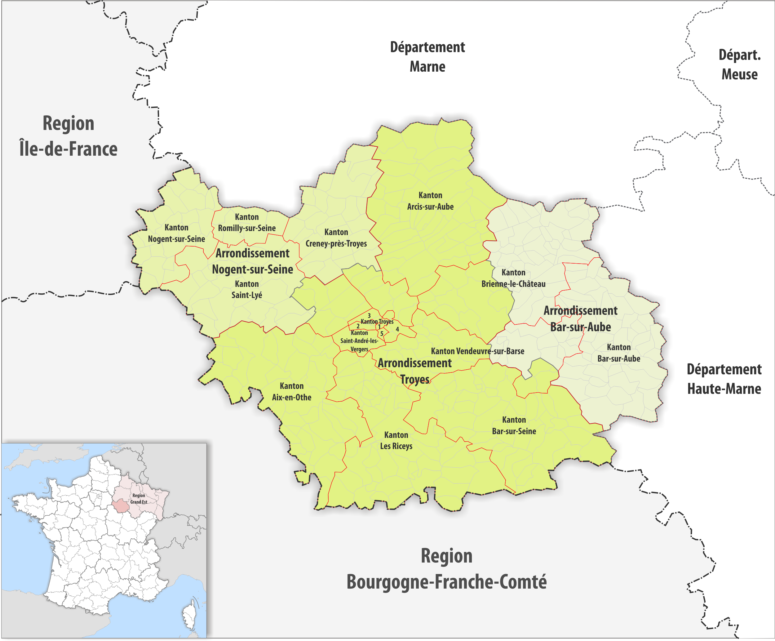 Gemeinden, Kantone und Arrondissemente im Departement Aube